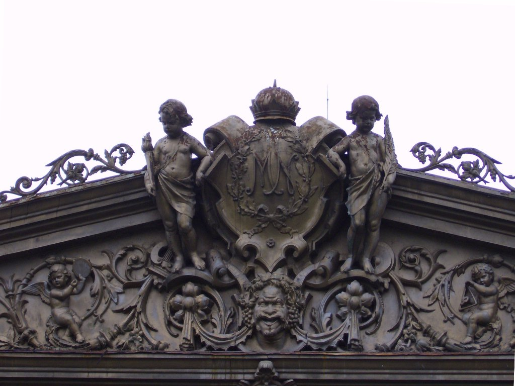 see title